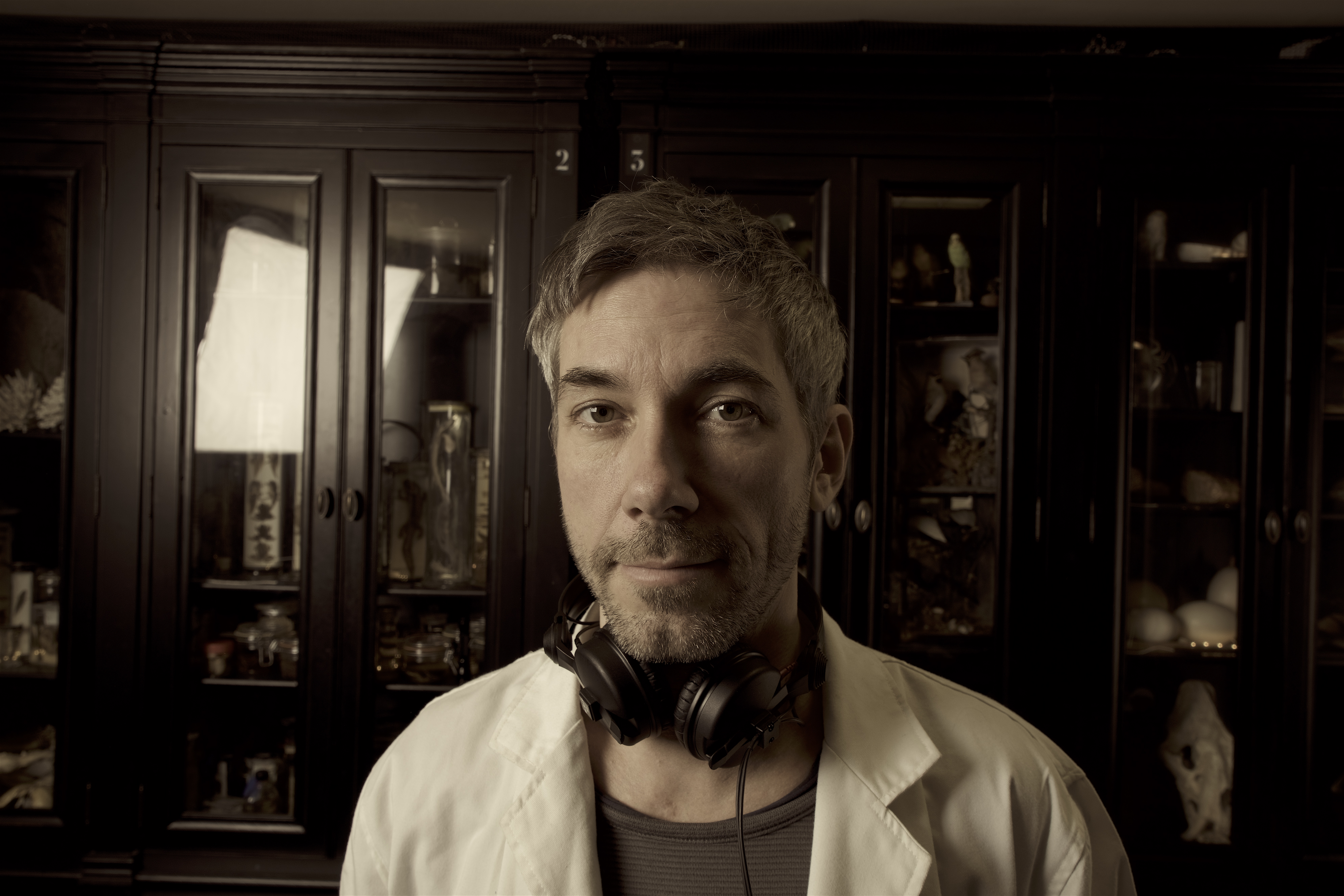 Sven Meyer in seinem KYMAT Labor in Hamburg. Forschung und Kunst mit Wasserklang Bildern.